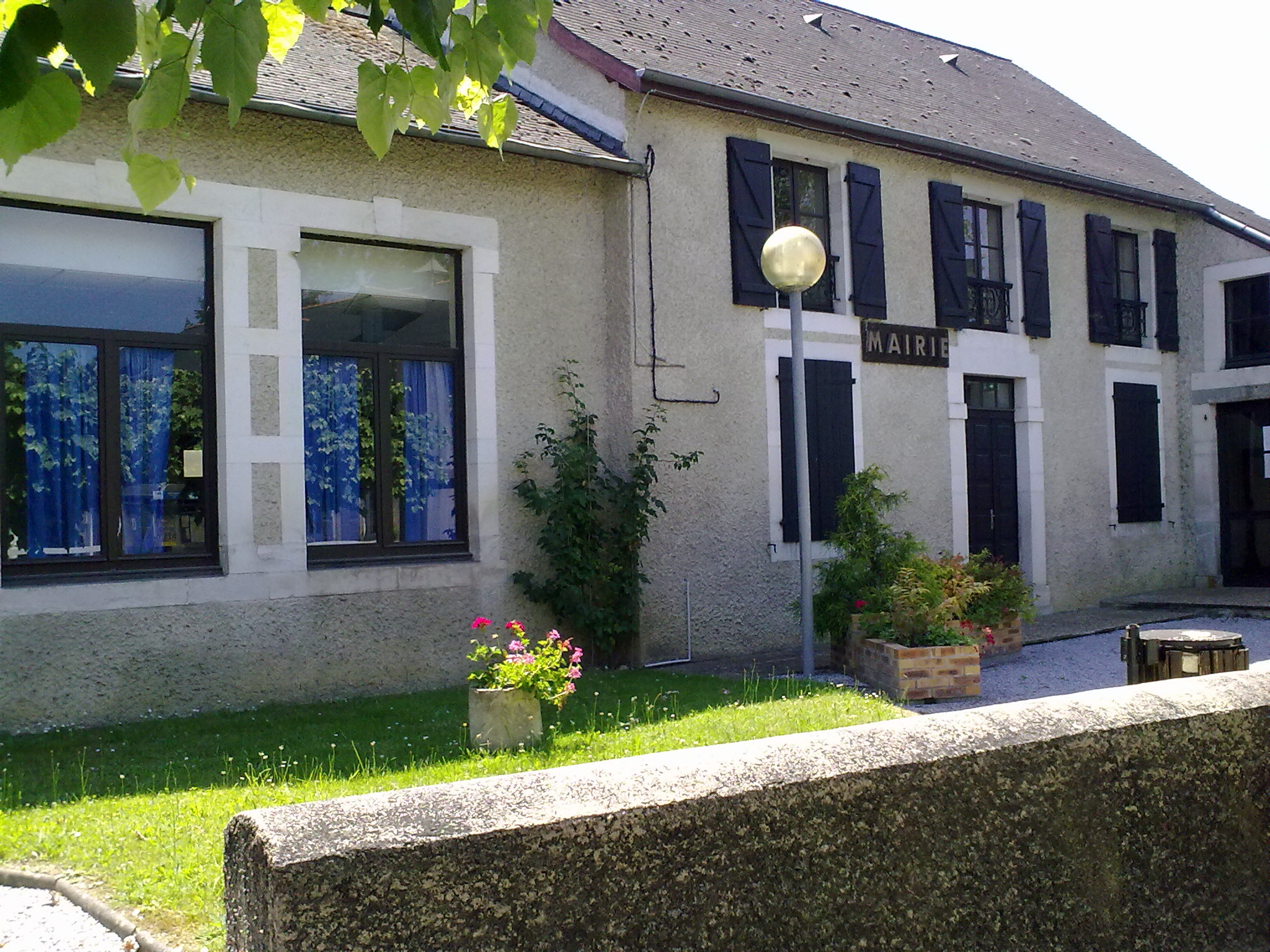 Mairie de Pardies-Piétat.